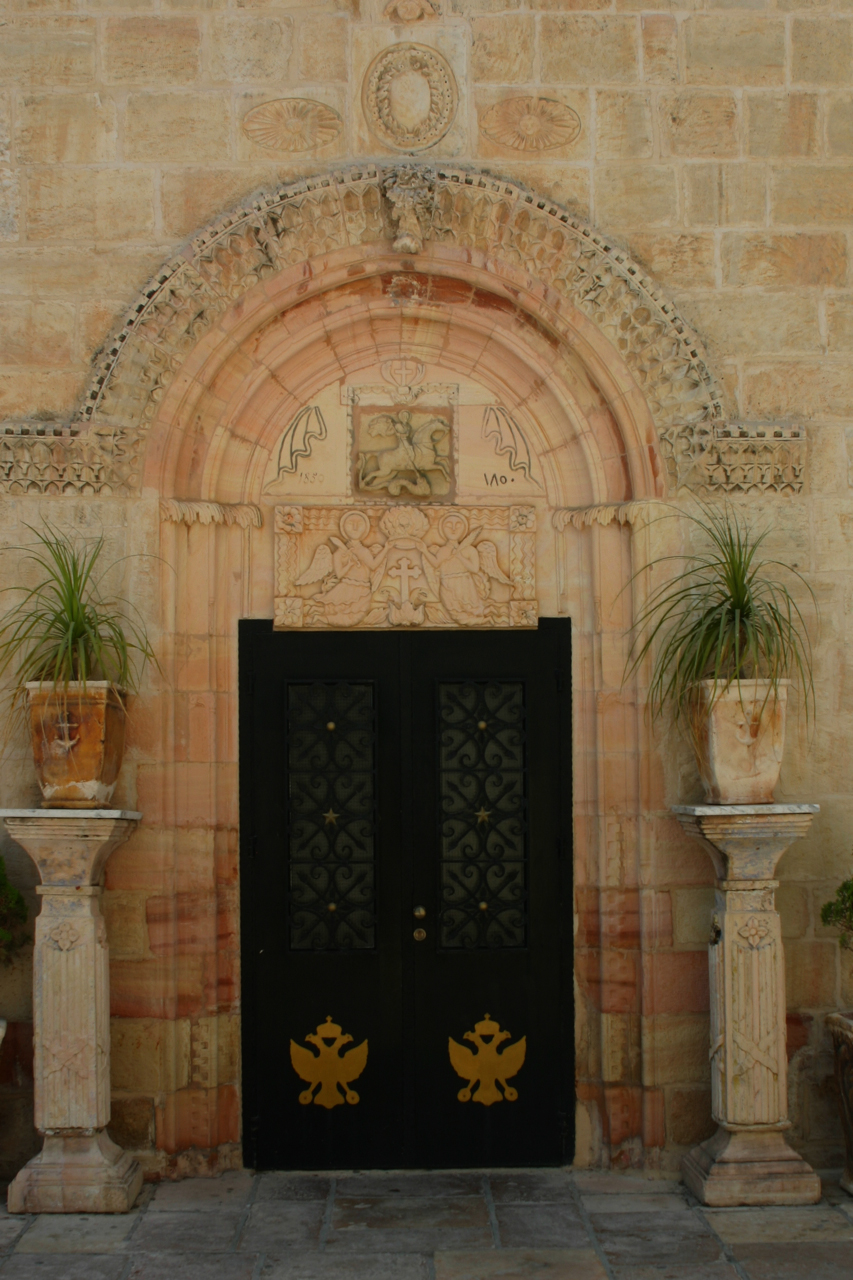 Ramallah in Palästina.